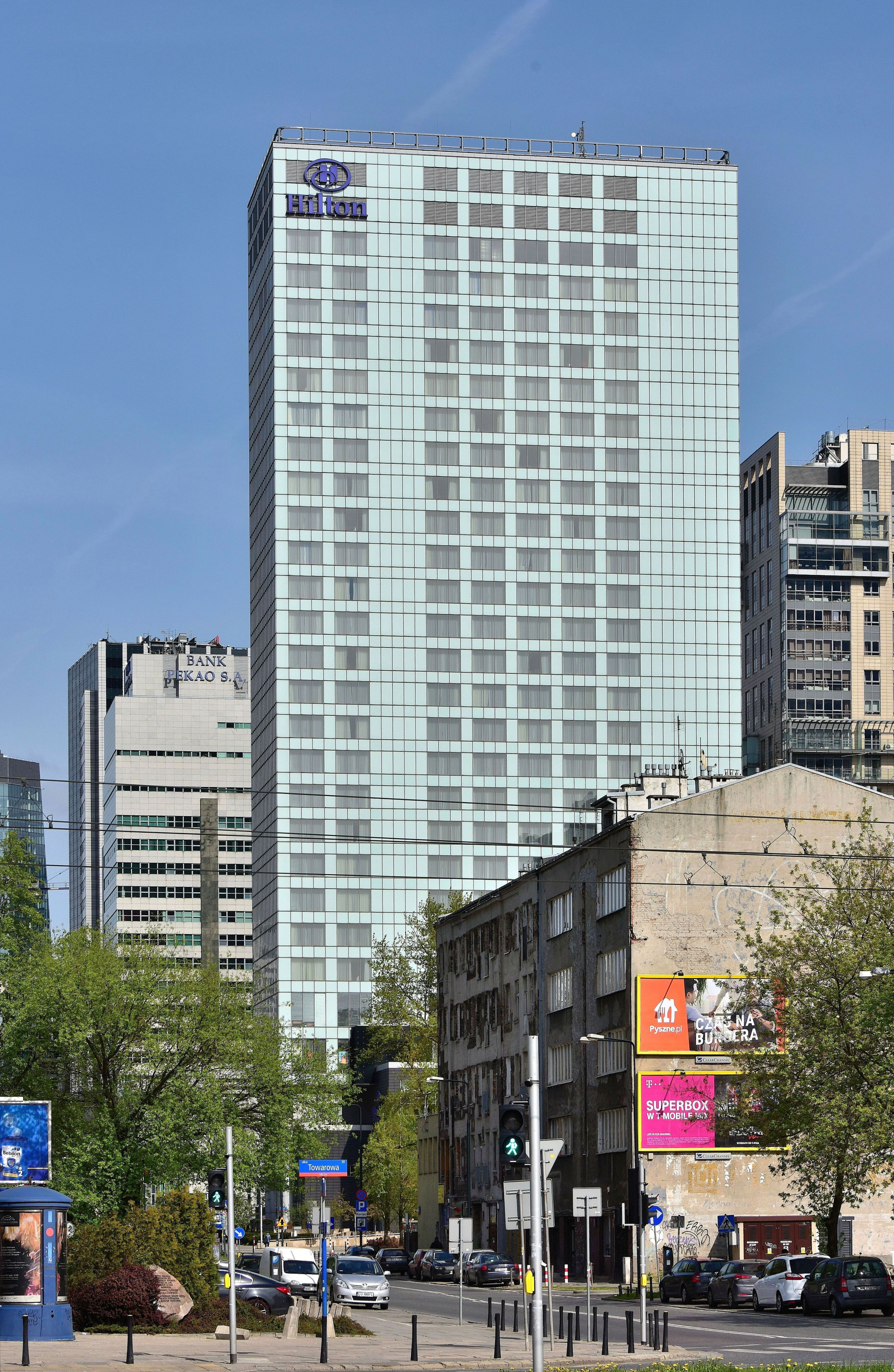 Hotel Hilton w Warszawie widziany z ul. Towarowej